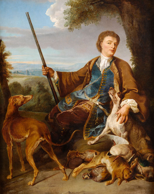 Anonym, 18. Jh.: Jäger mit Hunden und erlegtem Wild. Öl auf Leinwand, 107 x 87 cm